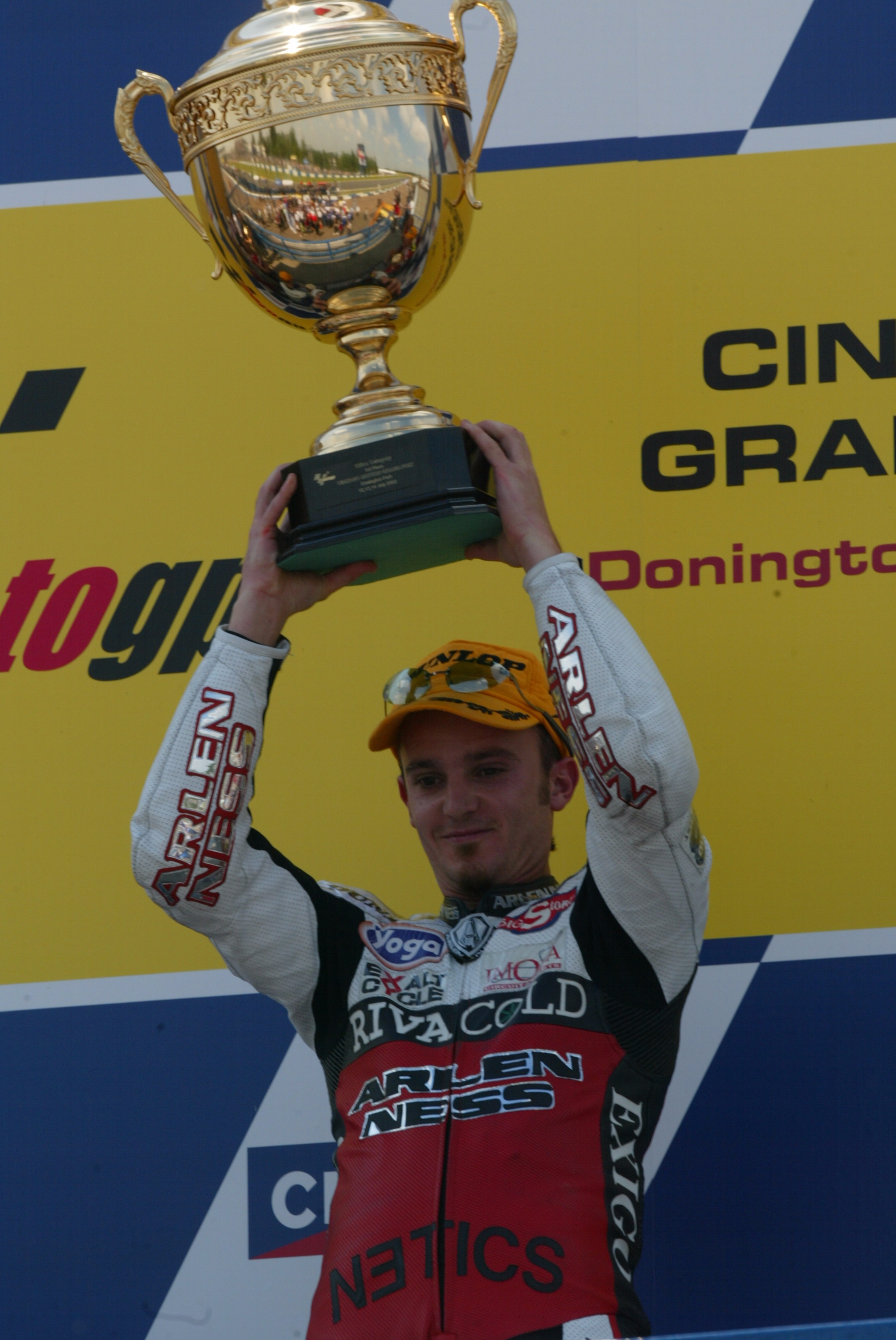 Arnaud Vincent Champion de Monde